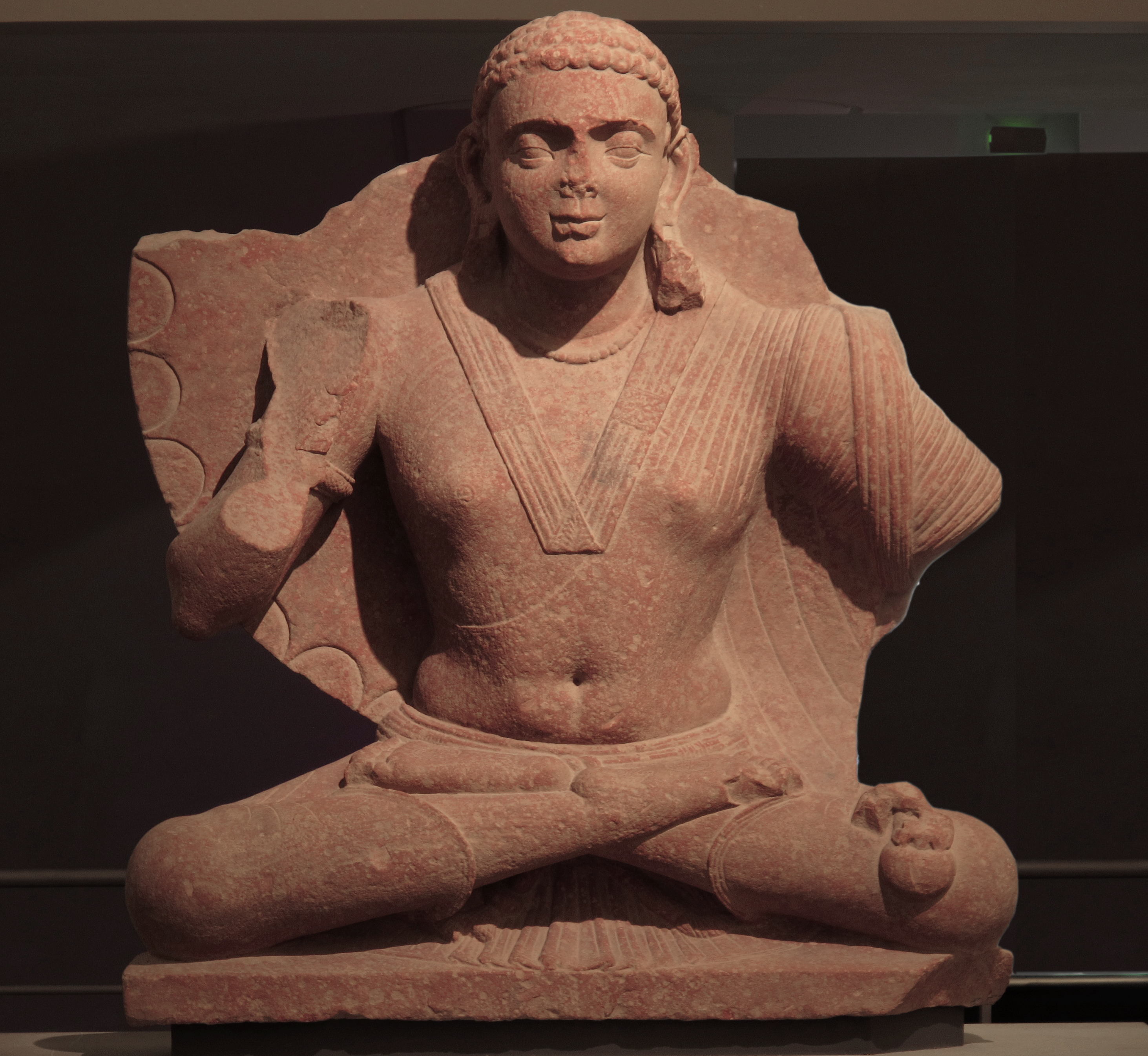 Le bodhisattva Maitreya. Uttar Pradesh, région de Mathura, époque kusana (Empire Kushan), fin du Ier ou première moitié du IIe siècle. Grès rouge, H. 115 ; L. 095 cm. Musée national des arts asiatiques - Guimet. MA 6774